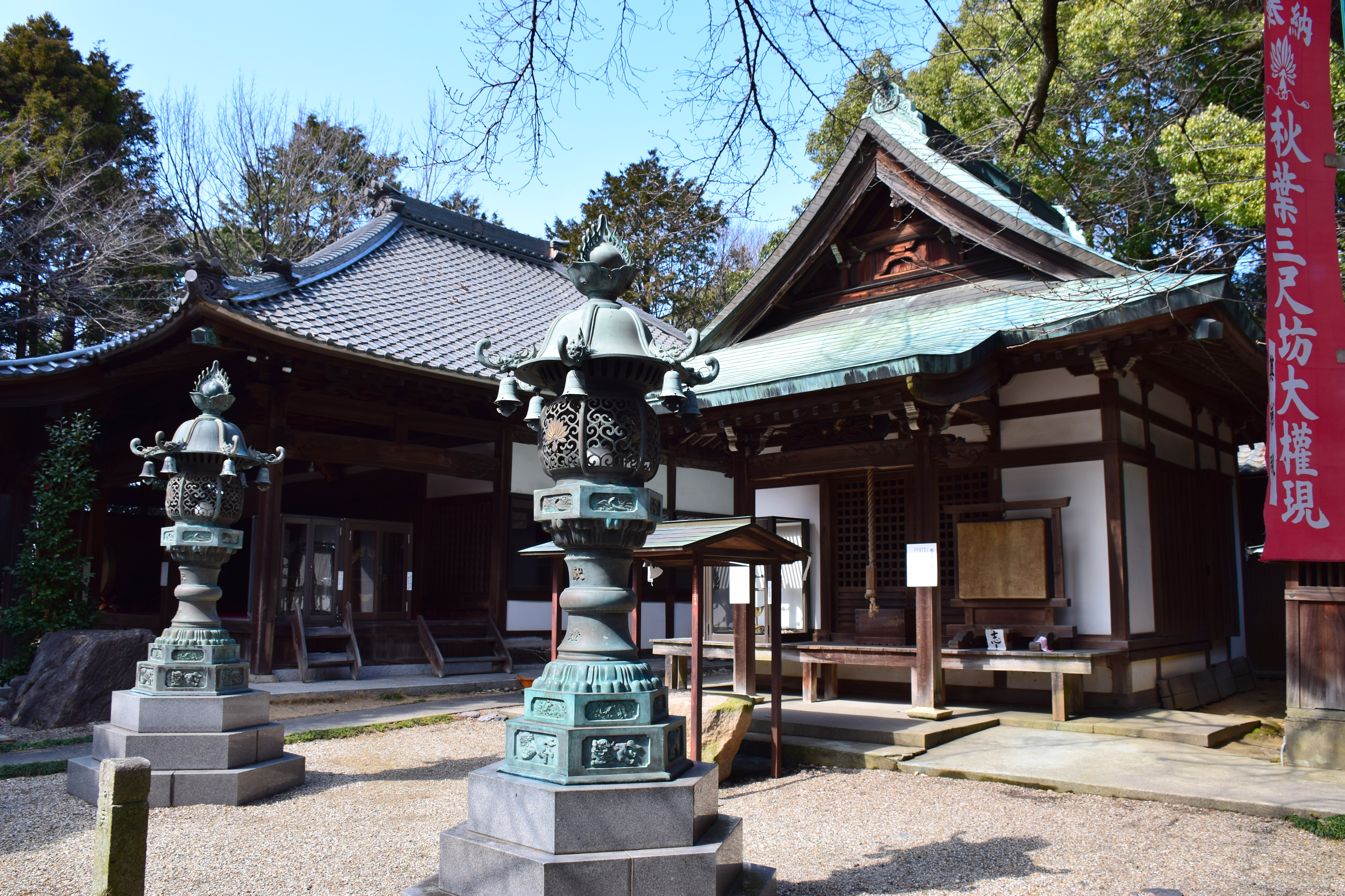 慈眼寺本堂